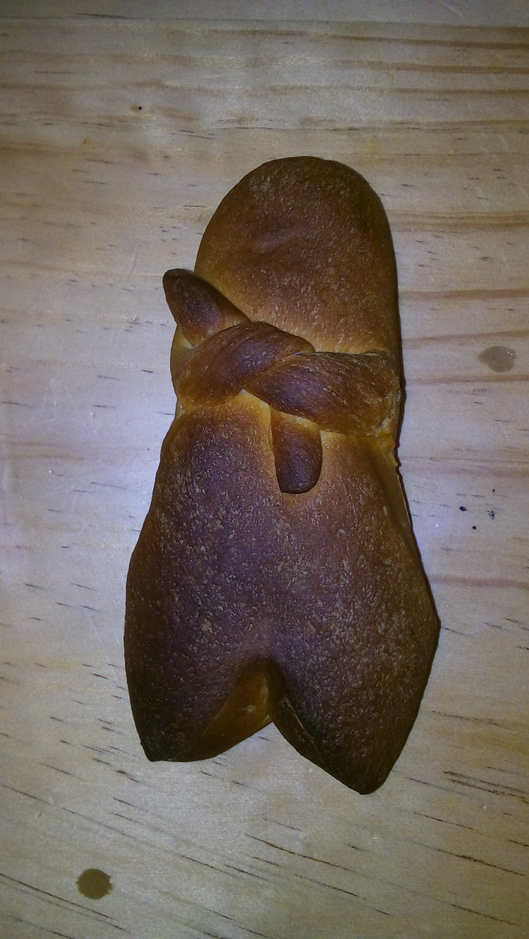 Pan de Muerto de Putla de Guerrero, Oaxaca.